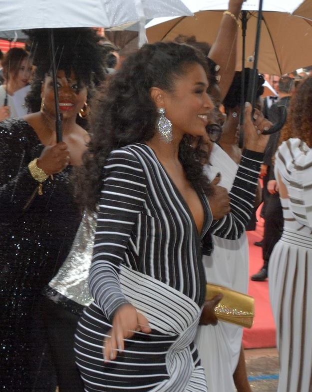 Sara Martins, Festival de Cannes 2018.